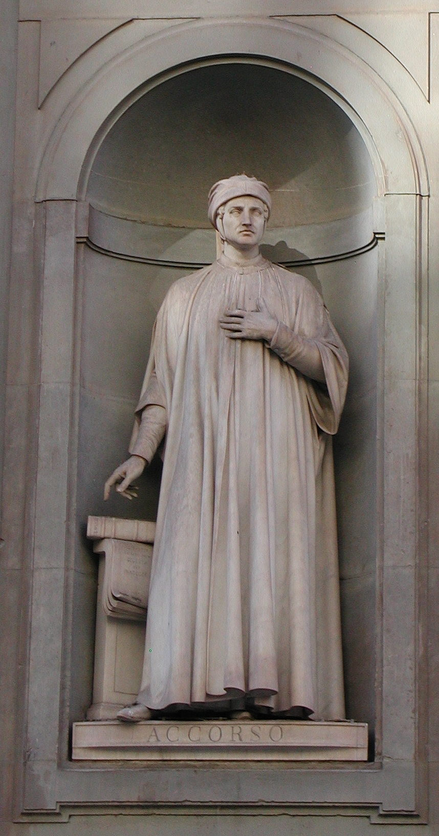 Statua di Accurso conosciuto anche come Accorso da Bagnolo e in latino Accursius (Impruneta, 1182 circa – Bologna, 1263) è stato un giurista e glossatore italiano, rappresentante della scuola di Bologna, allievo di Azzone. Ca. 1215.